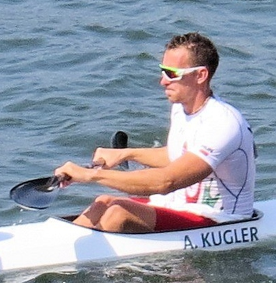 Sx50